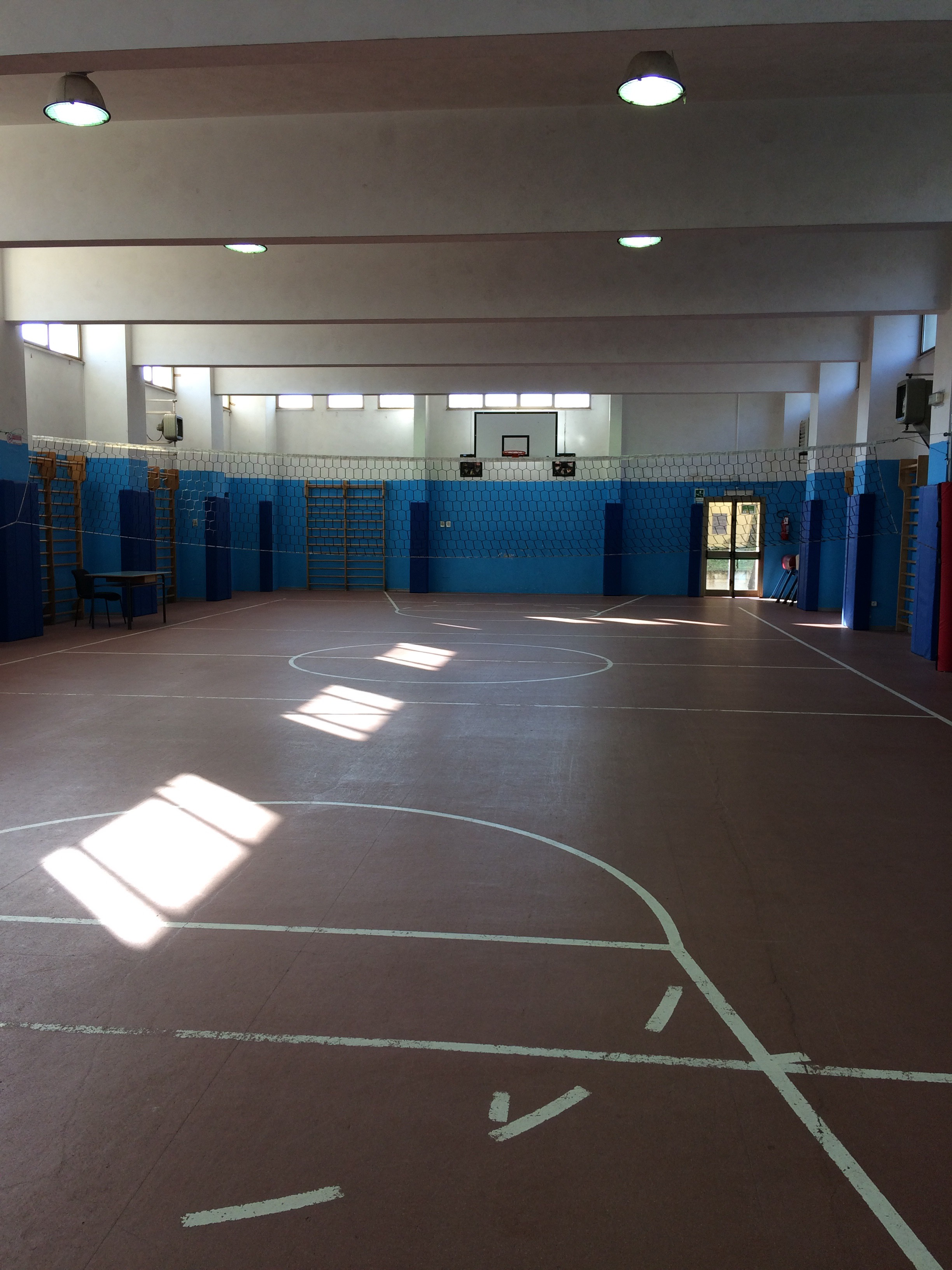 Palestra l.s. Galileo Galilei pz